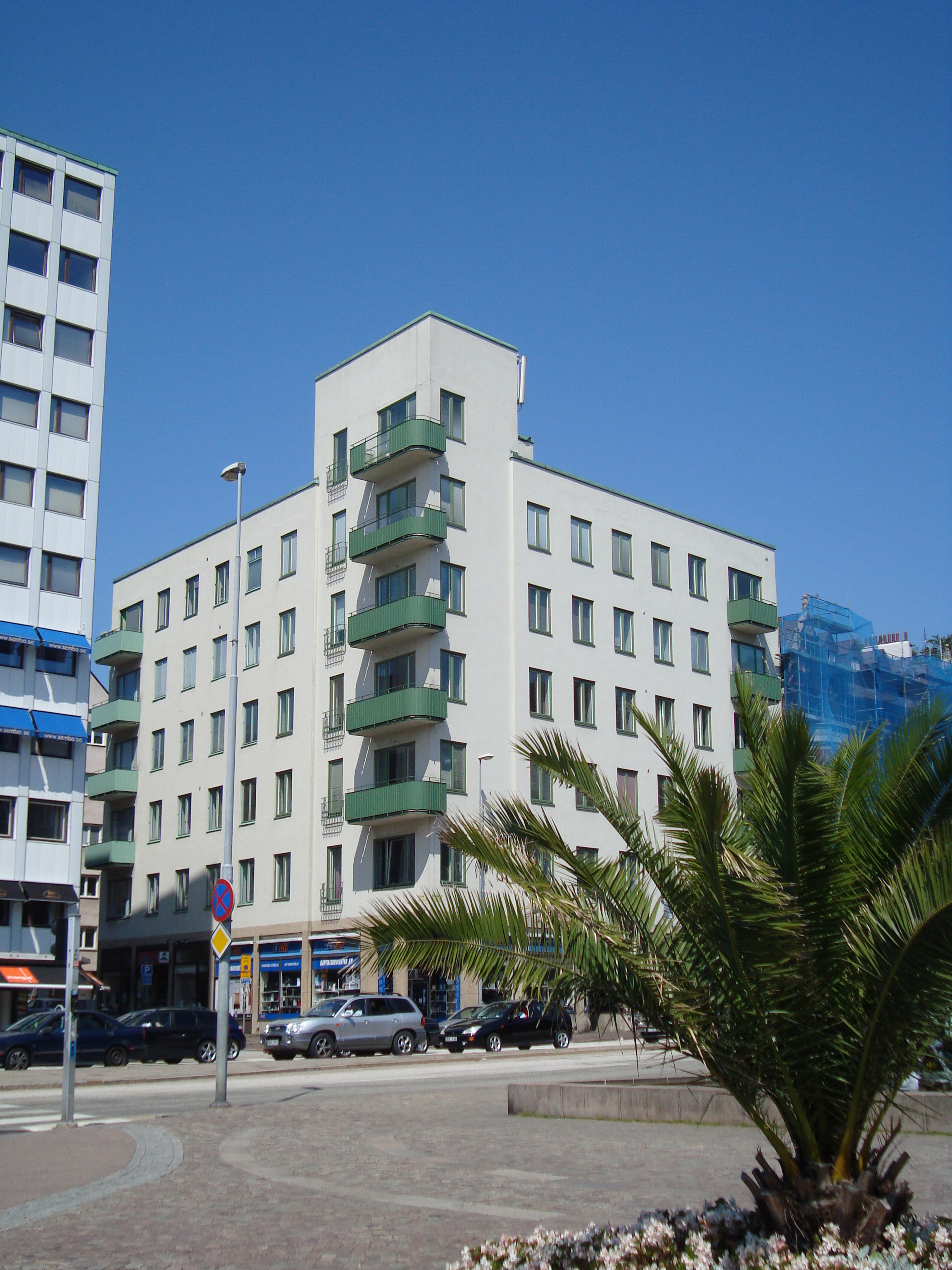 Sankt Jörgenspalatset i Helsingborg.